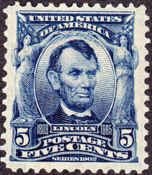 US Postage Issue, 1903 Issue: Abraham_Lincoln_1903_Issue-5c.jpg